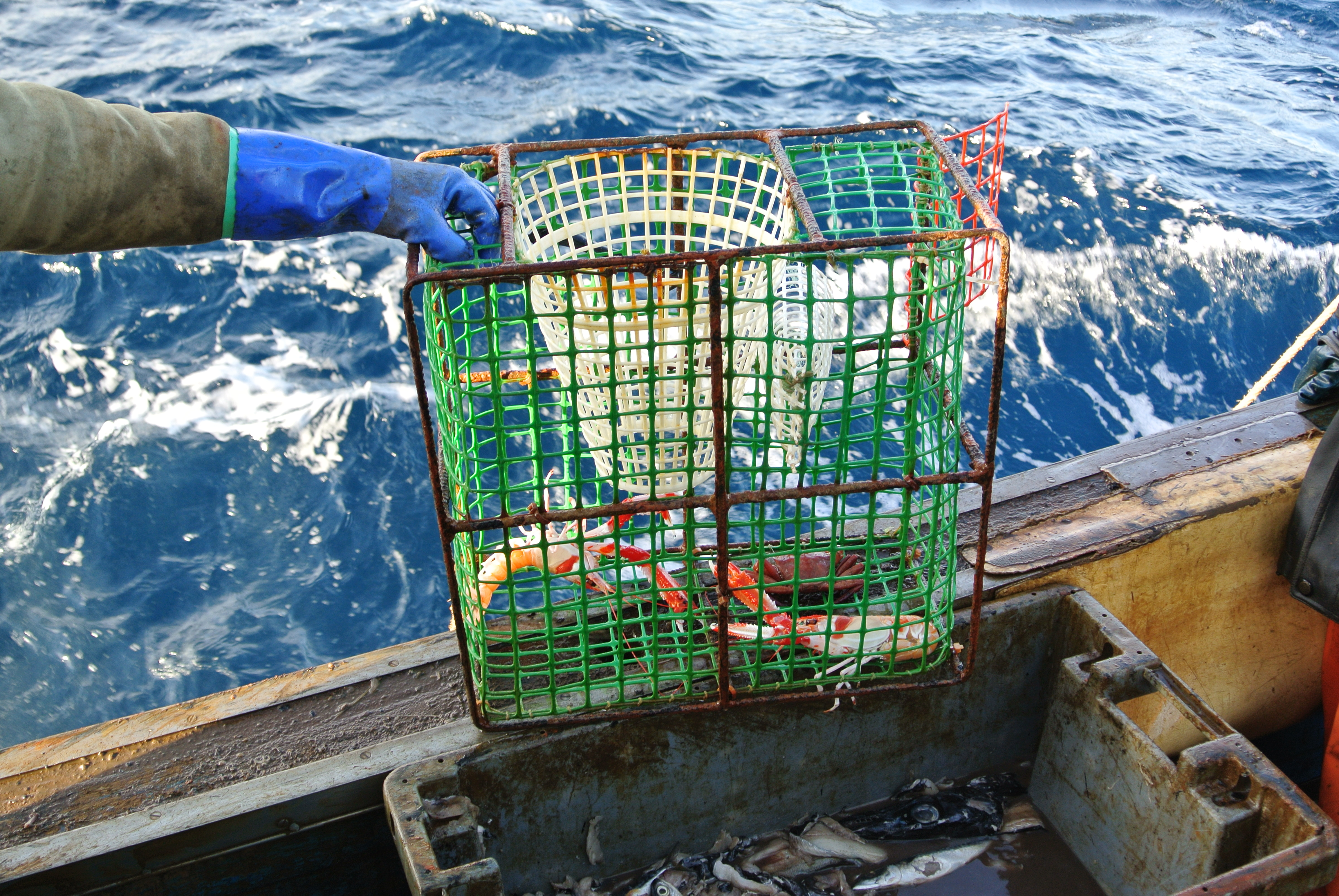 Zwei kapitale Kaisergranate in einer Reuse (Portugal) / Two capital Norway Lobsters in a creel (Portugal)